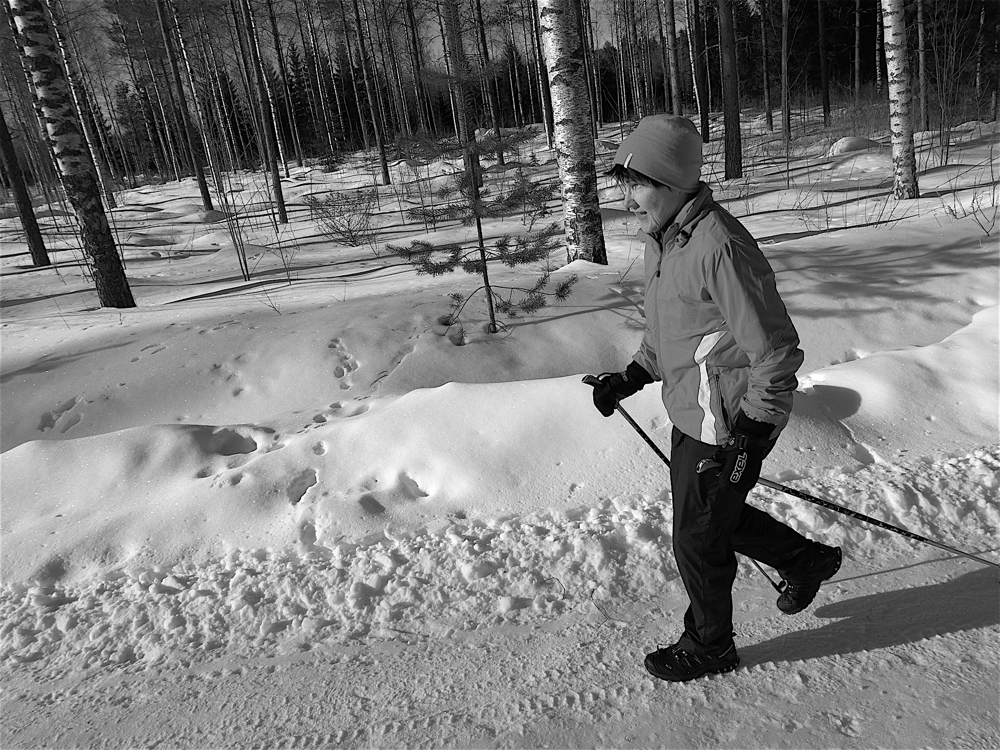 Sauvakävely